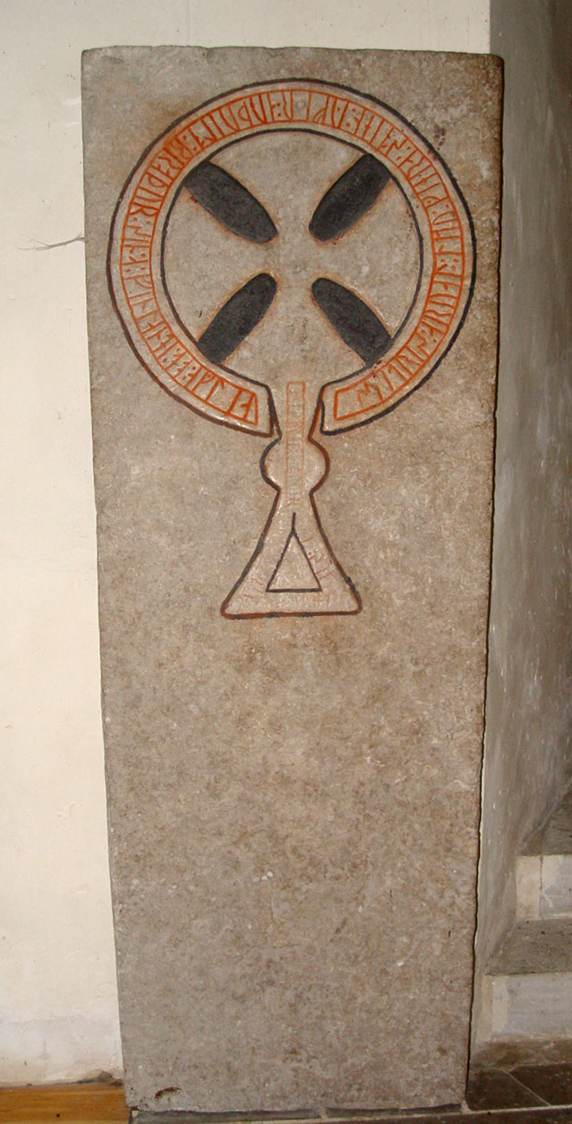 Bildstein (G 319) in der Rute kyrka (Gotland).